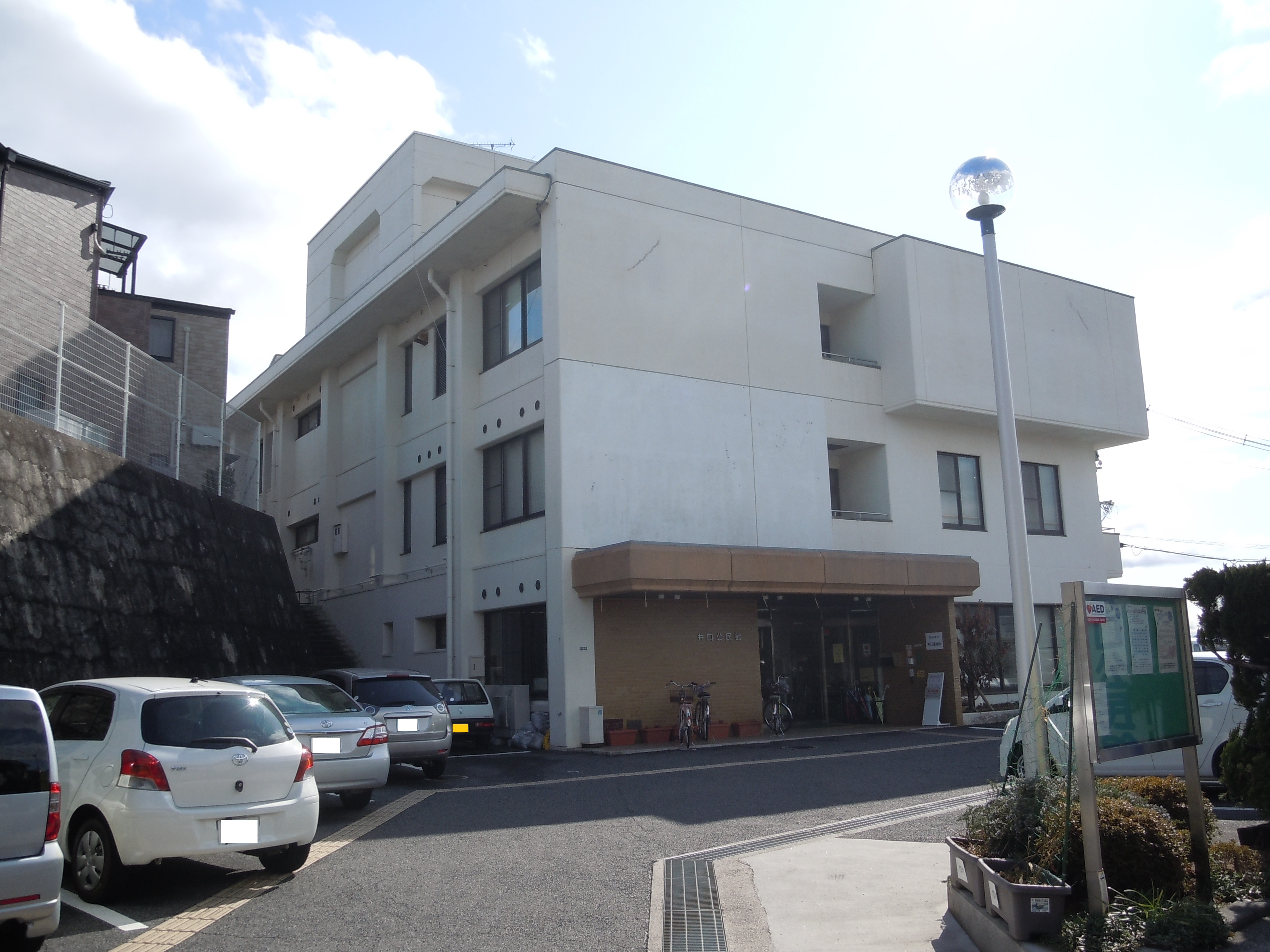 井口公民館 (広島市)